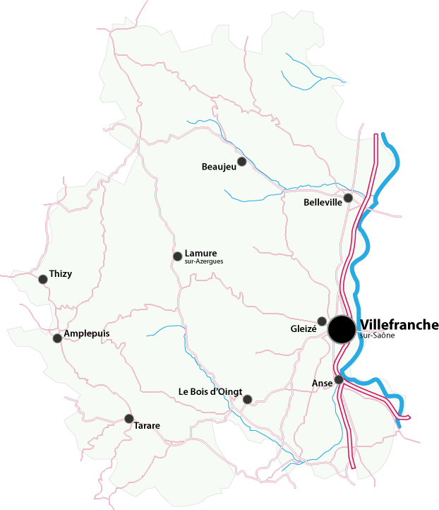 Carte des principales communes du Beaujolais.